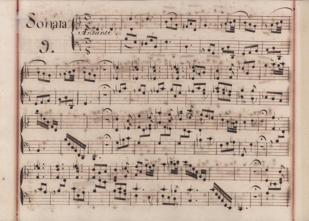 La sonate K. 426, telle qu'elle se présente dans le manuscrit de Venise, volume X no. 9.